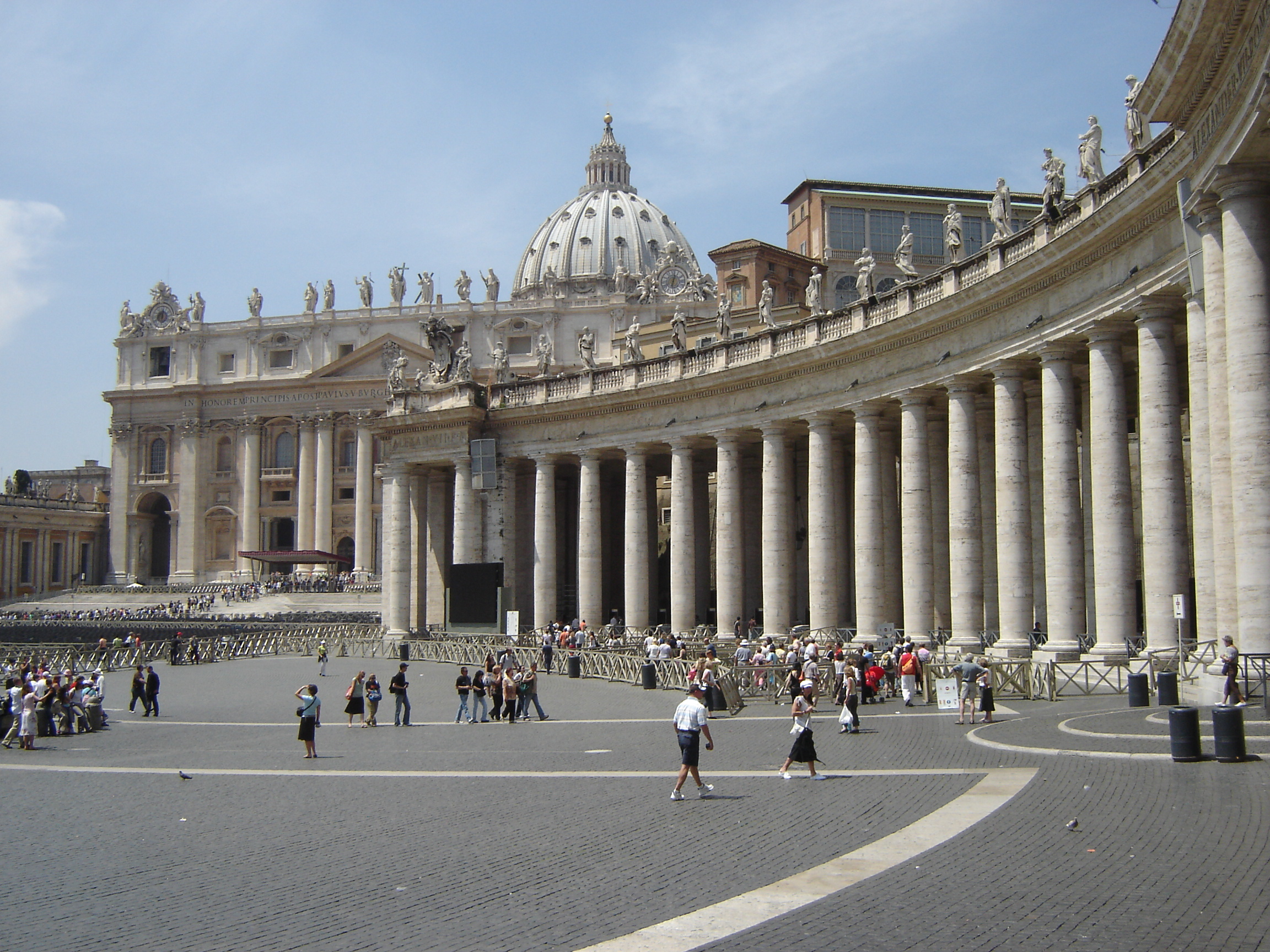 Vatican